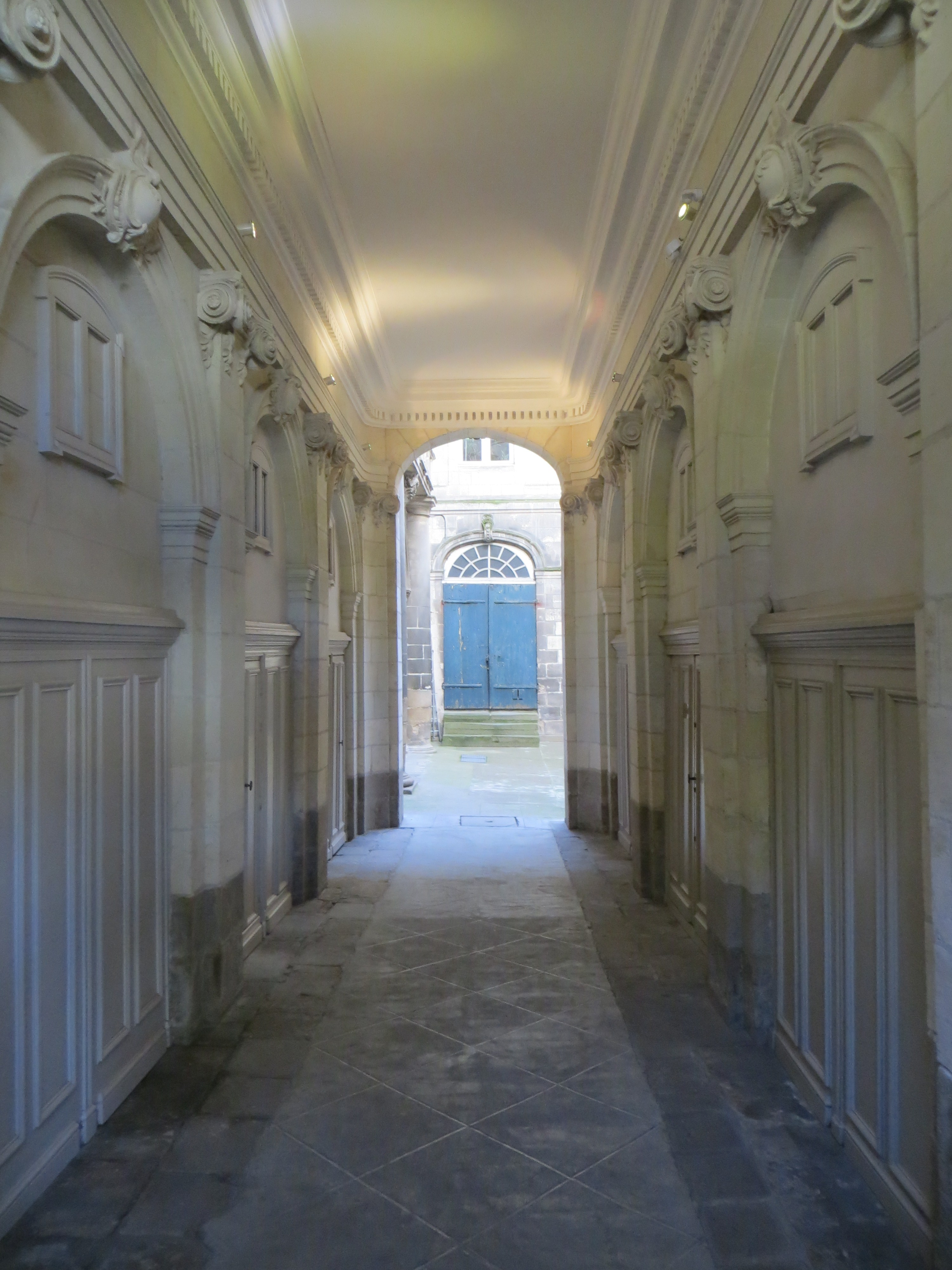 Temple du Goût couloir côté quai